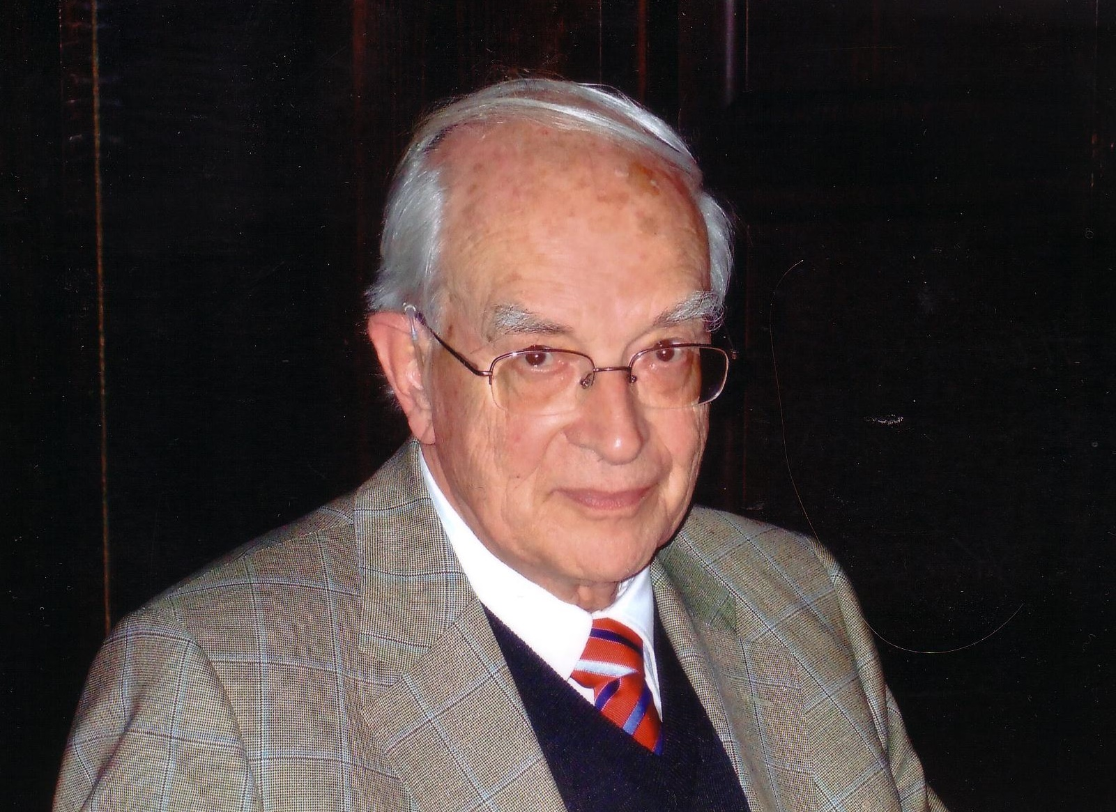 Porträtfotografie von Prof. Dr. Horst Kramer (Göttingen) am 85. Geburtstag